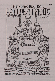 "Buen gobierno. Presidente, oidores, alcaldes, fiscal y alguacil mayor de este reino" (Audiencia Real). Facsímil de un grabado (representando a los oidores de una Real Audiencia) en la colección de la Biblioteca de la Corte Suprema de Chile.